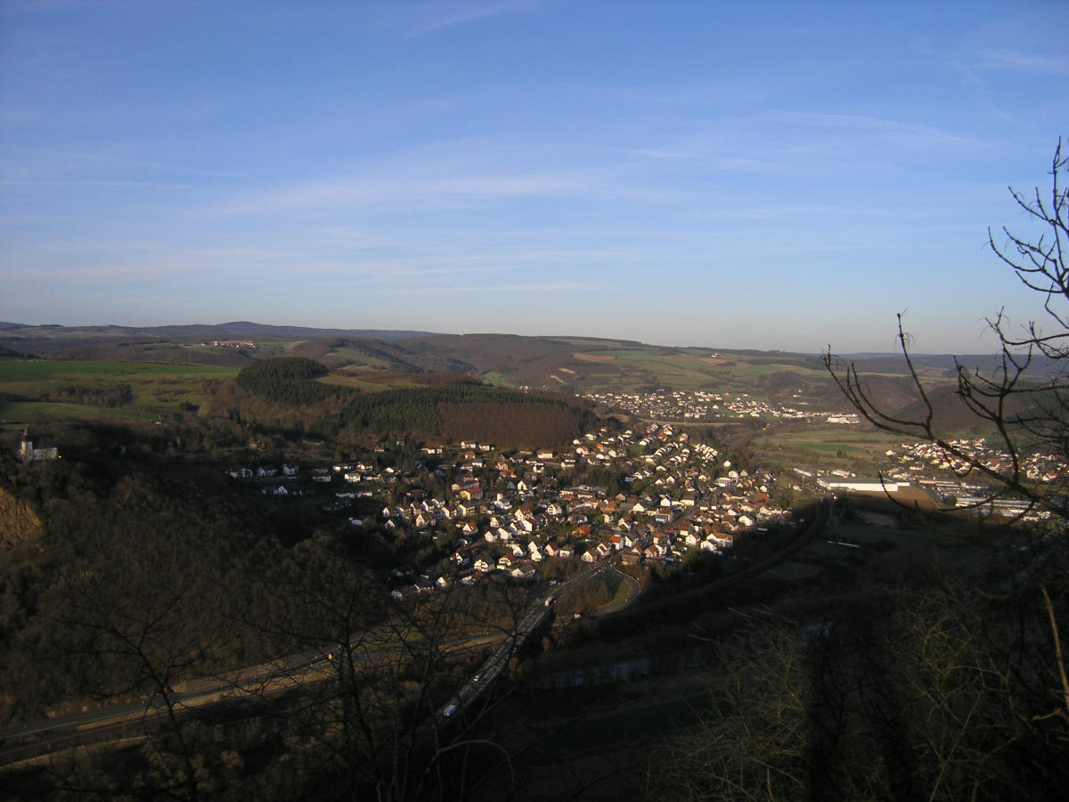 Ortsteile St. Johannisberg, Hochstetten und Hochstädten. Im Hintergrund: Simmertal